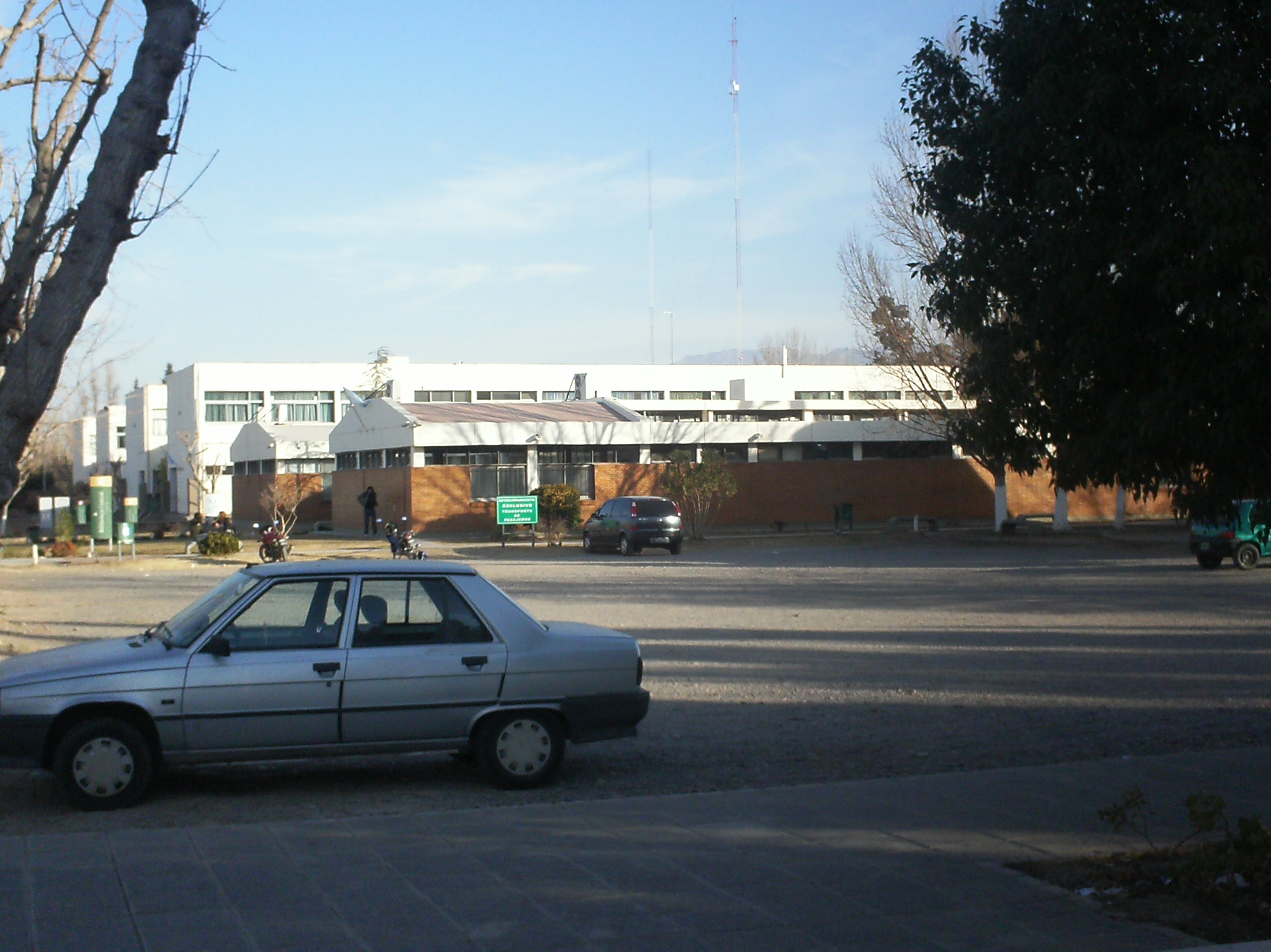 cuerpo de edificio de aulas de un piso en la entrada de la universidad